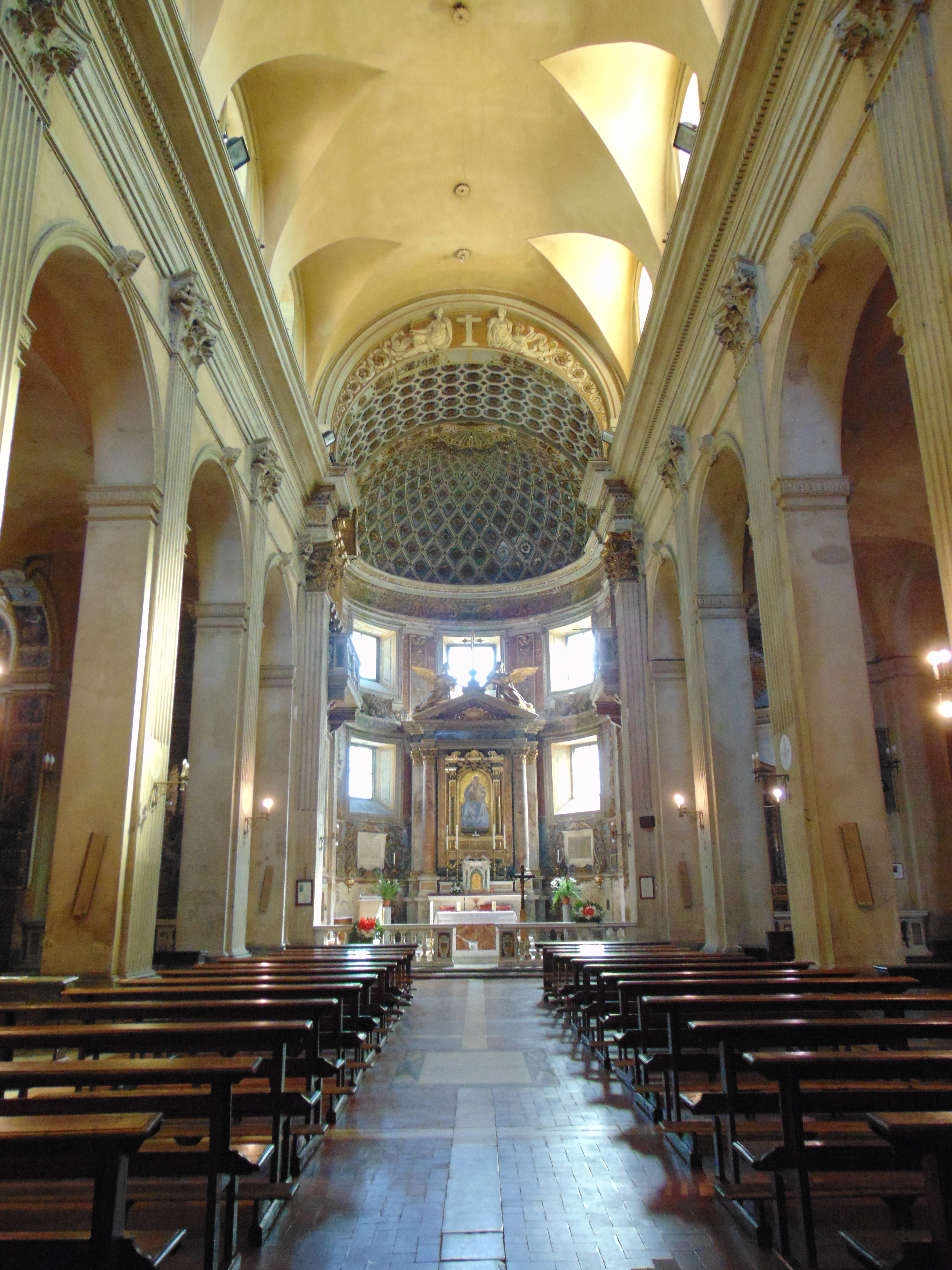 Chiesa di Santa Maria della Consolazione (Roma)